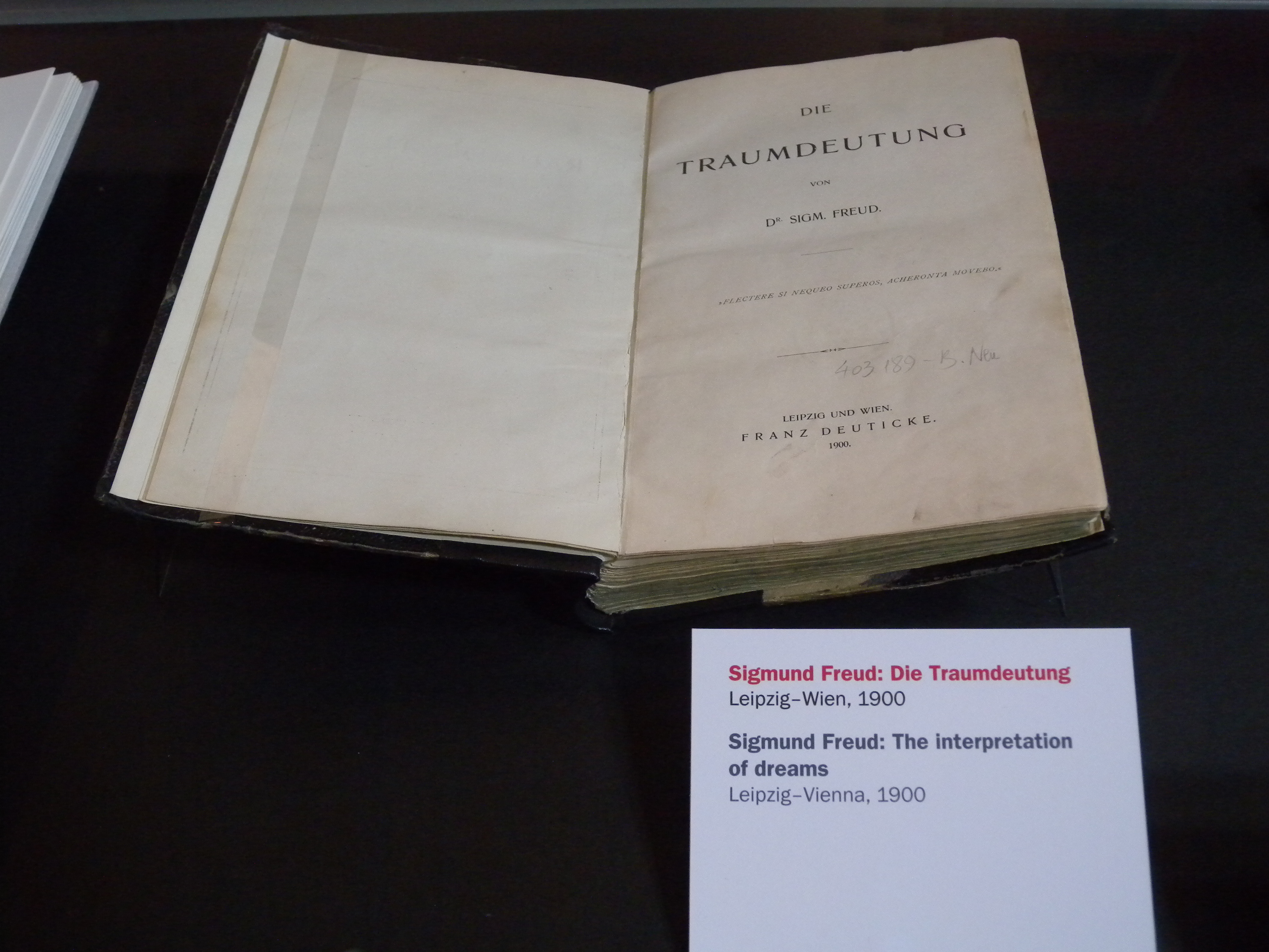 Ausstellungsstück im Prunksaal der Österreichischen Nationalbibliothek im Rahmen der Ausstellung "Zwischen Königgrätz und Córdoba": Sigmund Freud: Die Traumdeutung